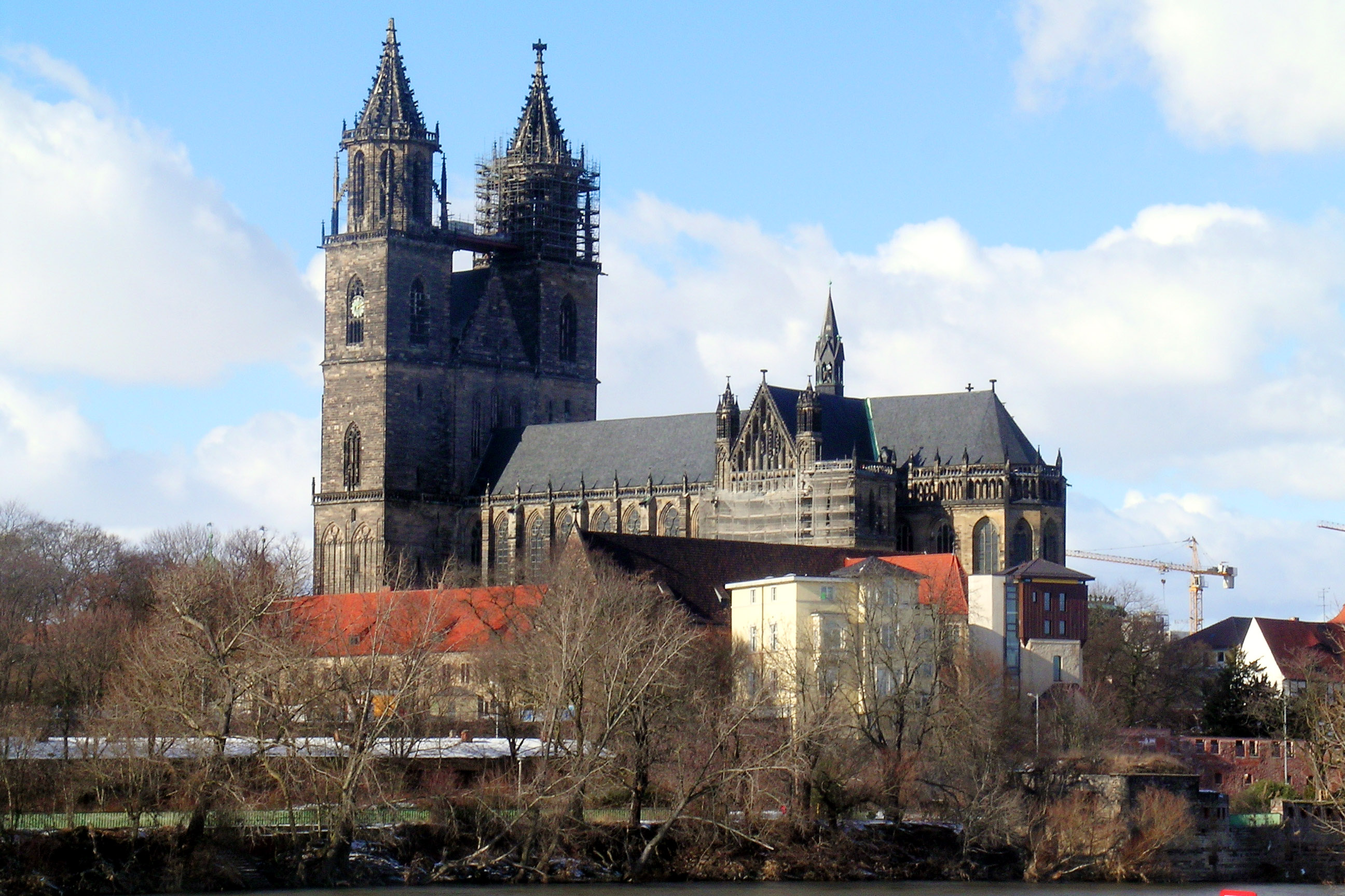 MagdeburgerDom